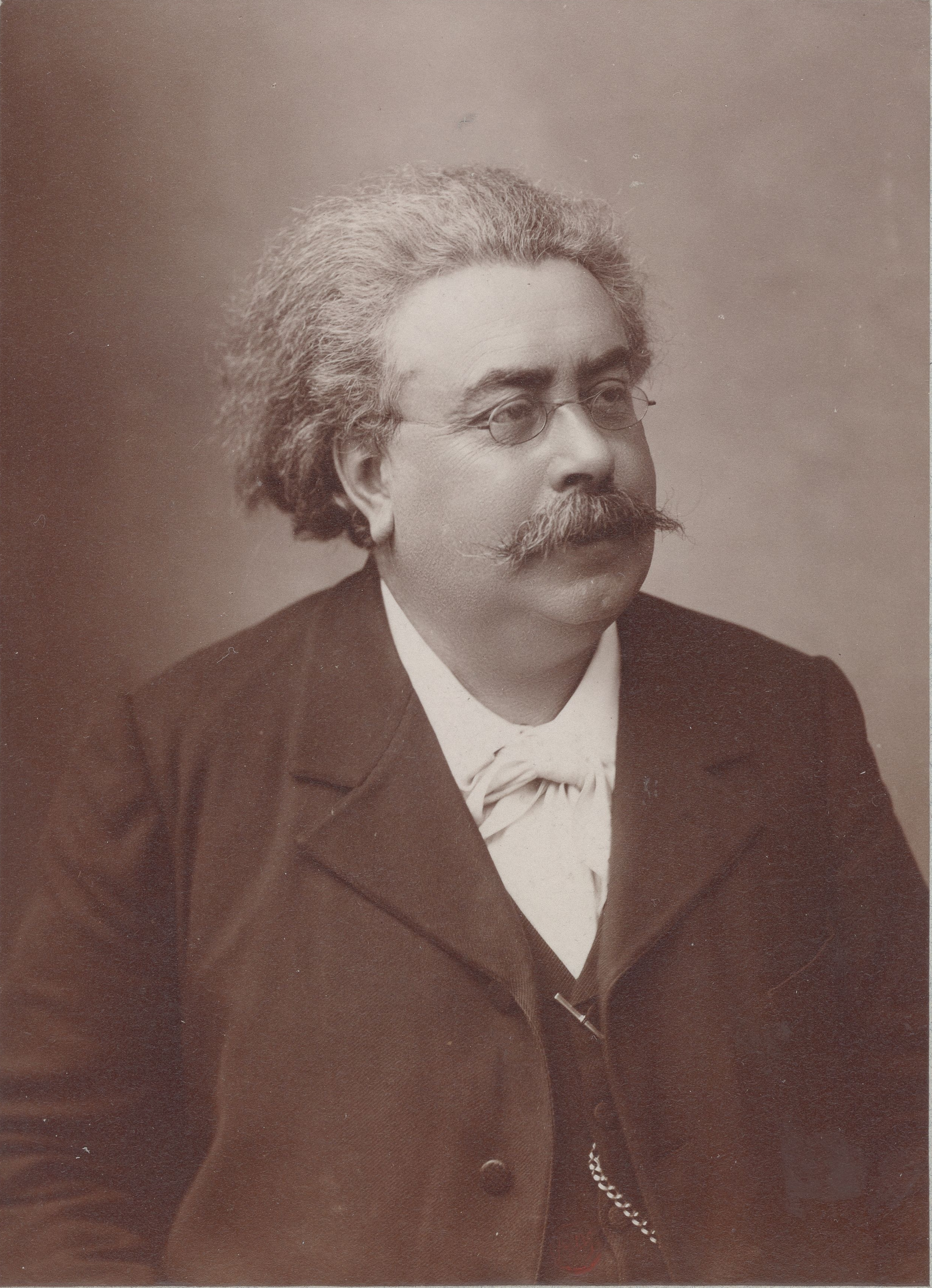 Photographie d'Octave Pradels par Nadar entre 1875 et 1895